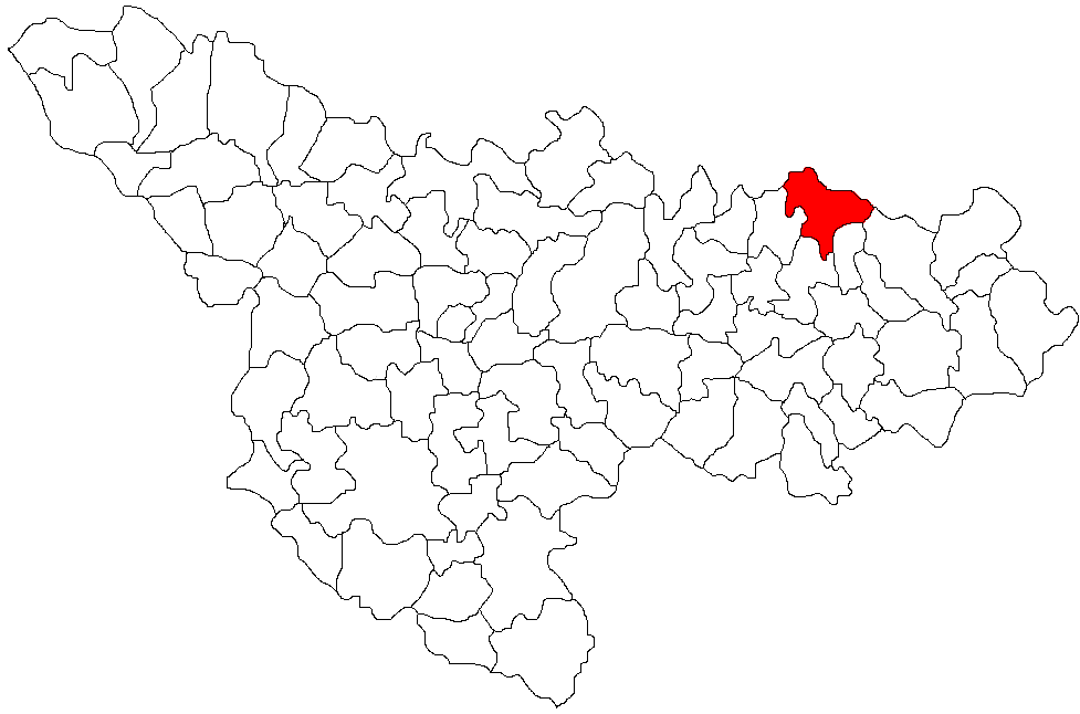 Categorie:Hărţi ale judeţului Timiş